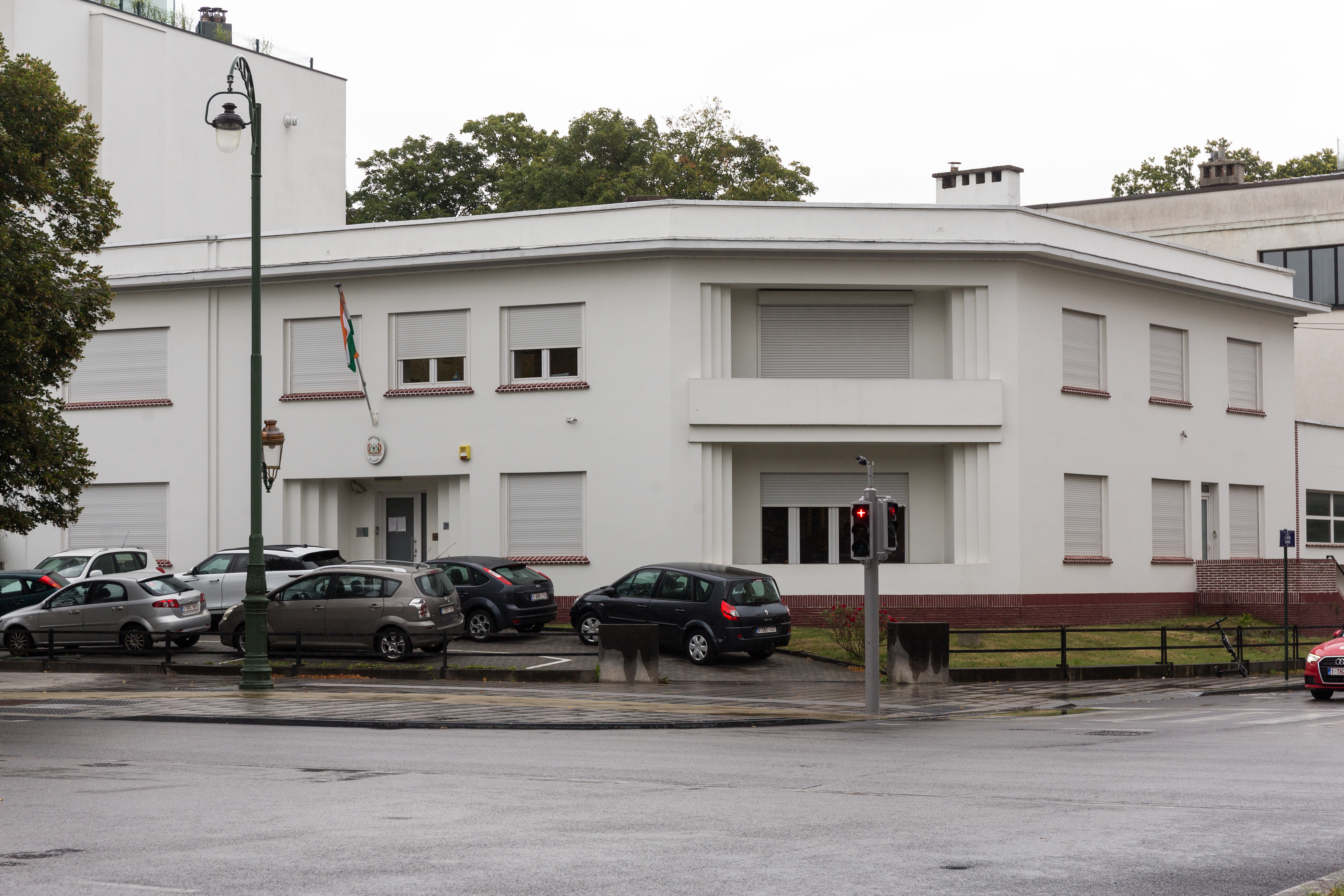 Ambassade du Niger en Belgique, avenue Franklin Roosevelt 78 à Bruxelles.